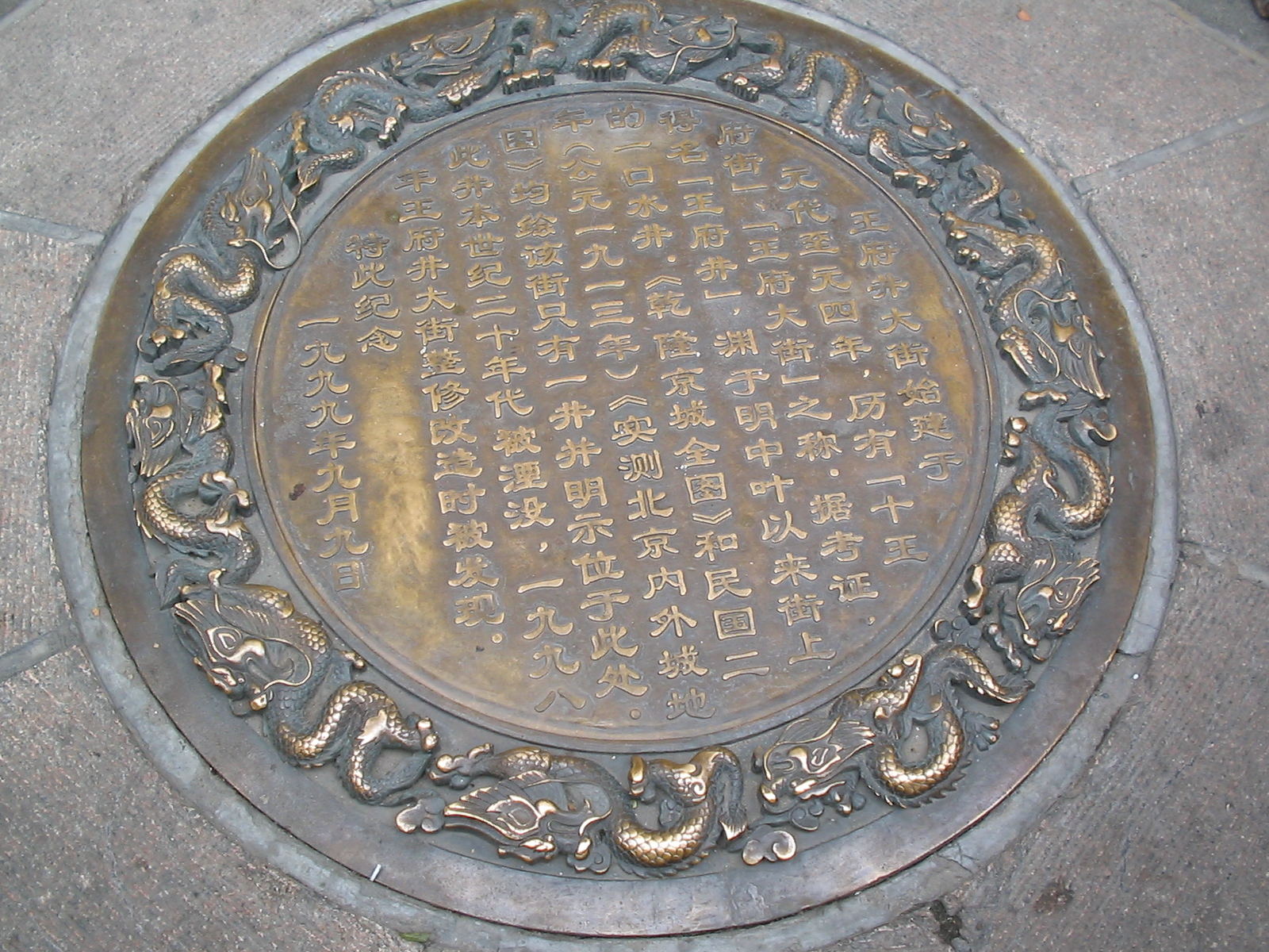 摄于北京王府井大街。